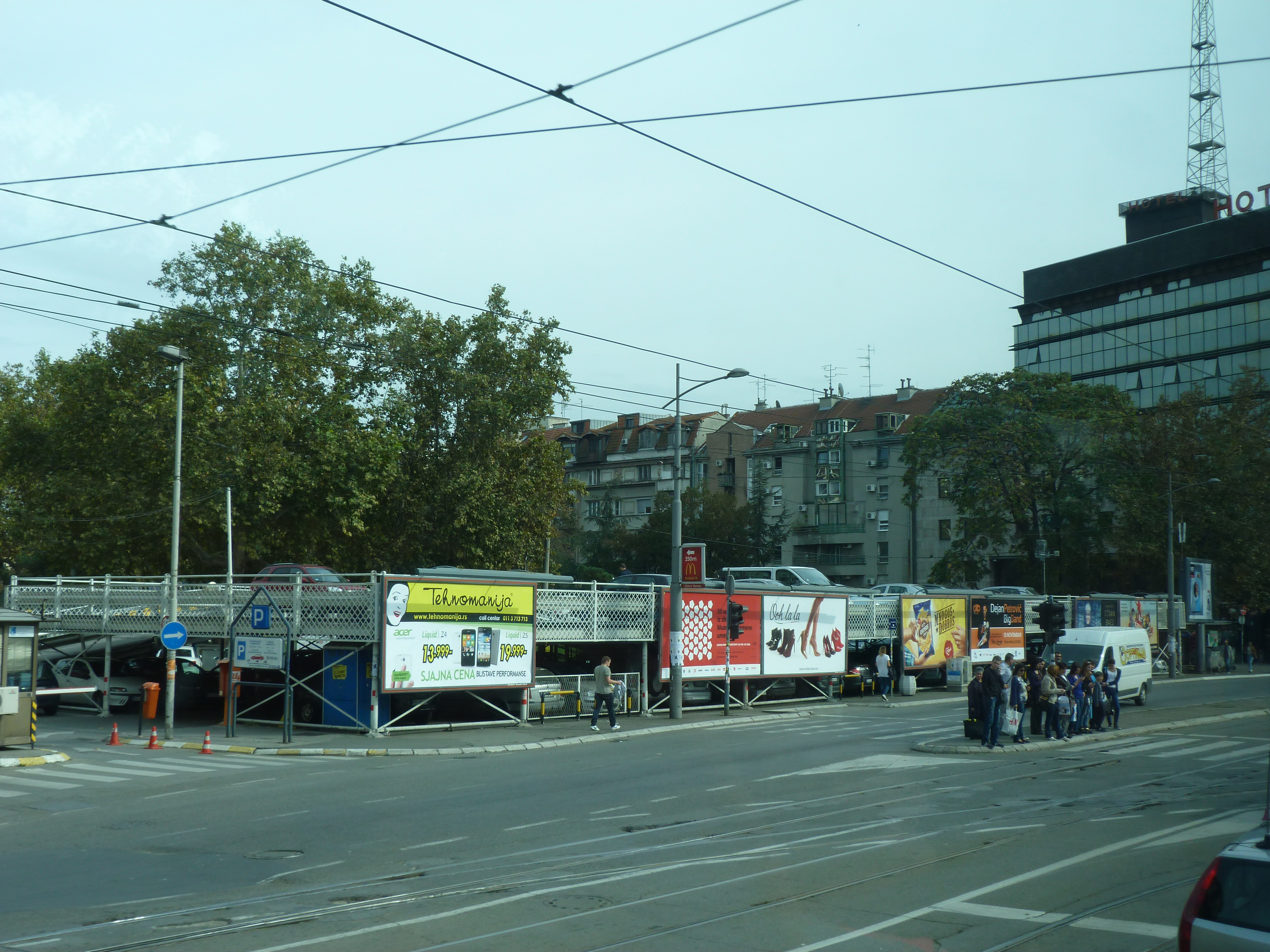 A felvétel 2014. október 21-én készült Nándorfehérváron. ©© Derzsi Elekes Andor, Budapest, 2014, A kép egészben, vagy részletekben másolását, bármilyen úton történő sokszorosítását és felhasználását a szerző ellenérték nélkül, jogutódjaira is kihatóan megengedi. Az engedély kiterjed a kereskedelmi célú hasznosításra is. Kéri azonban nevének feltüntetését a felhasználás során. A Metapolisz sorozat valamennyi képe és filmje Creative Commons alatti valamint kereskedelmi - for profit - célra is felhasználható. Ajánlott hivatkozás: Derzsi Elekes Andor: Metapolisz DVD line